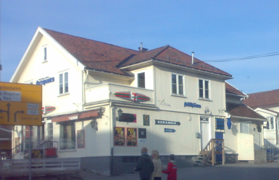 Ullern Avis Akersposten Røa Oslo Norway, tidl Randklevs Isenkram